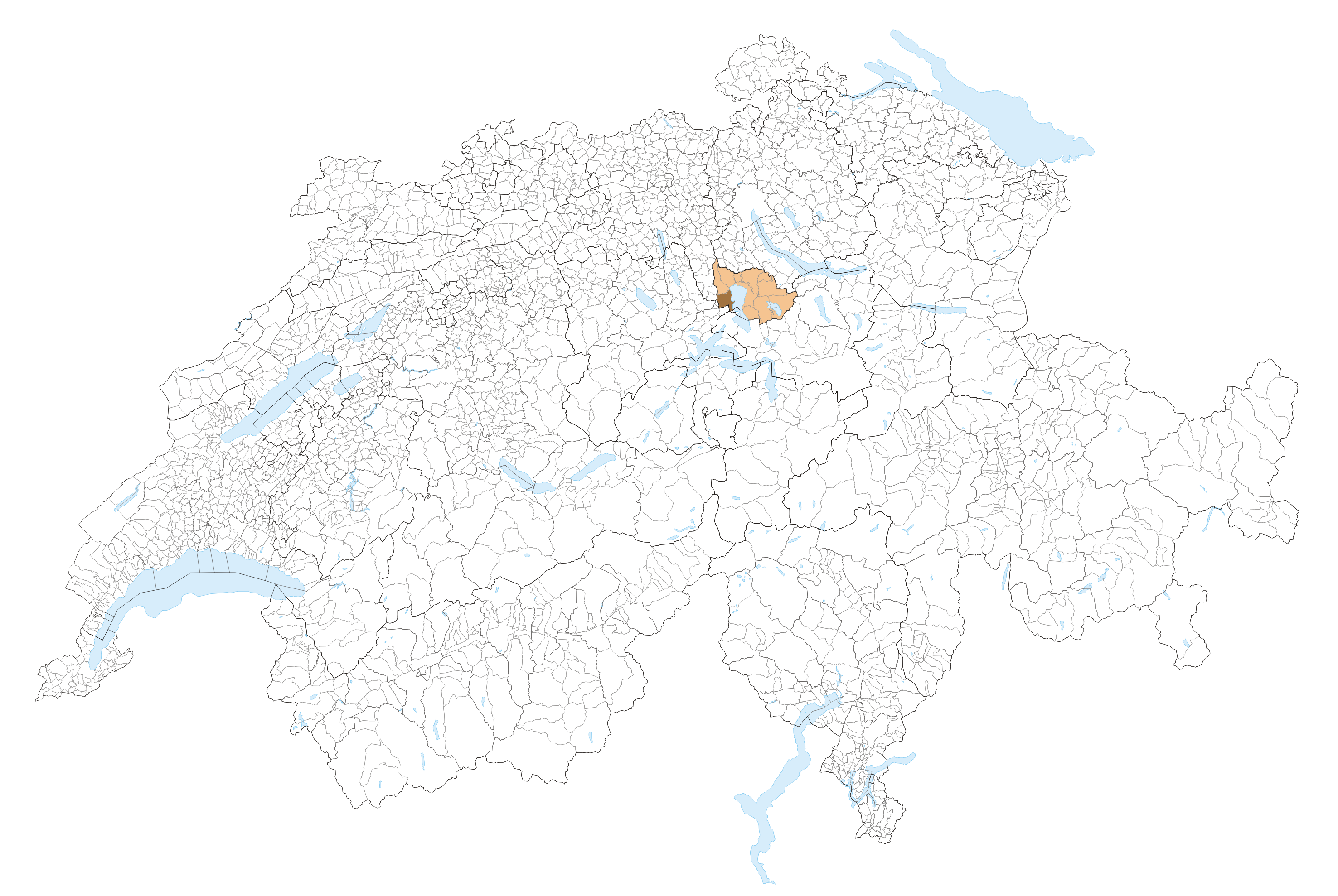 Community of Risch-Rotkreuz in the Canton of Zug. Gemeinde Risch-Rotkreuz im Kanton Zug. Kanton Zug Map drawn by Tschubby